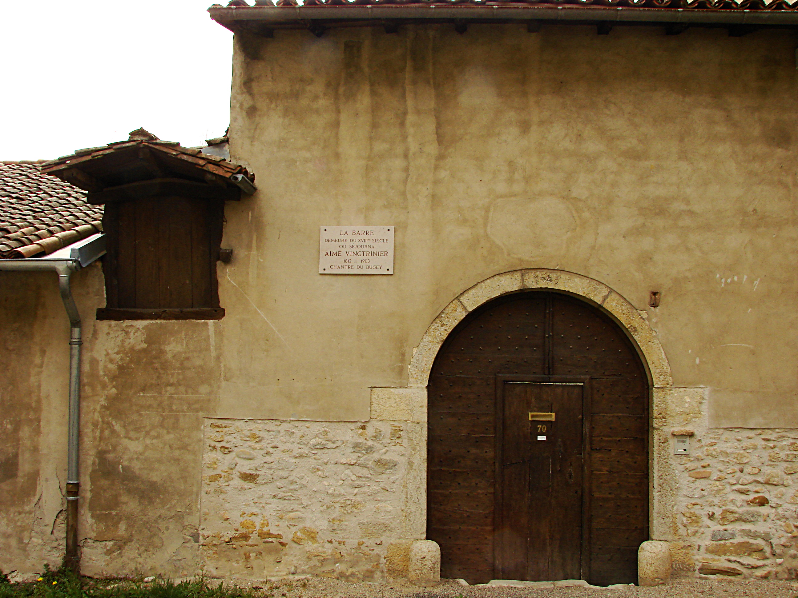 La demeure de la Barre à Ambérieu-en-Bugey, où habita Aimé Vingtrinier